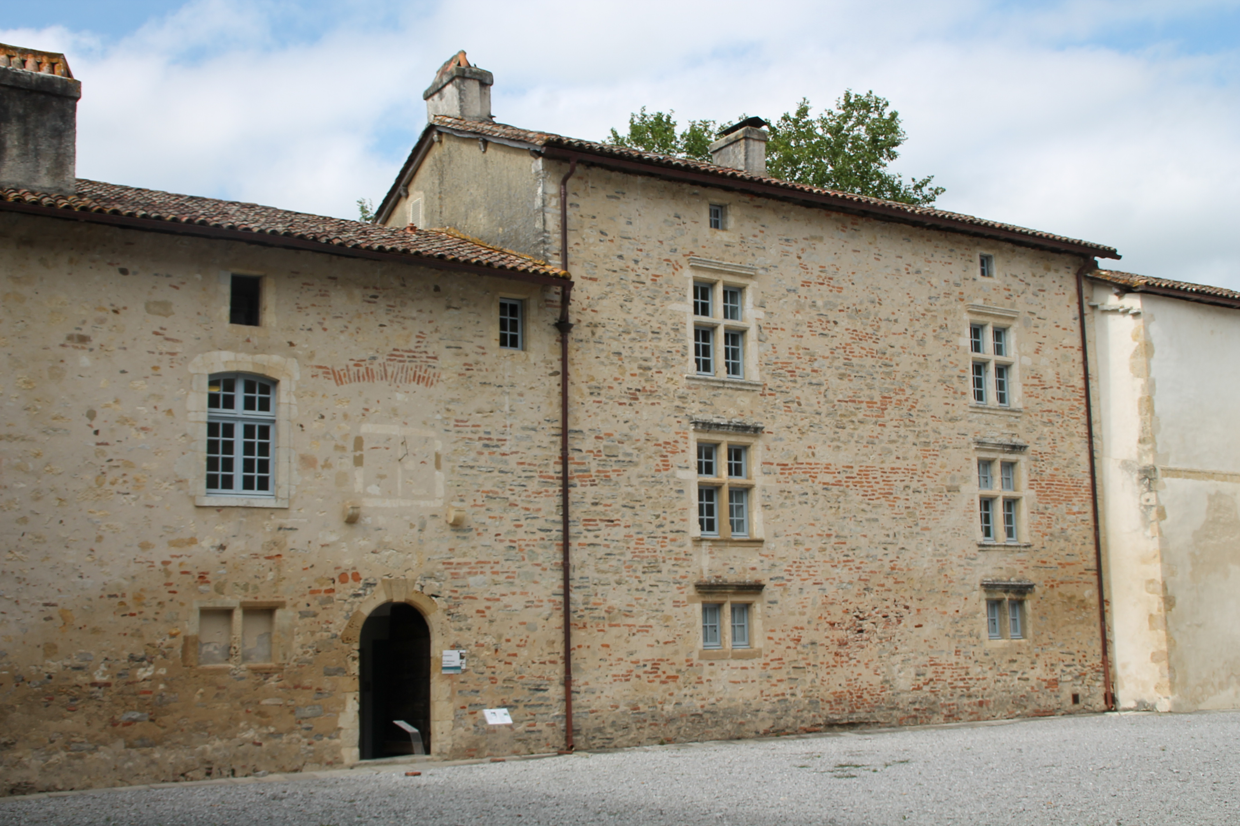 Logis abbatial de l'abbaye d'Arthous. Façade sud.